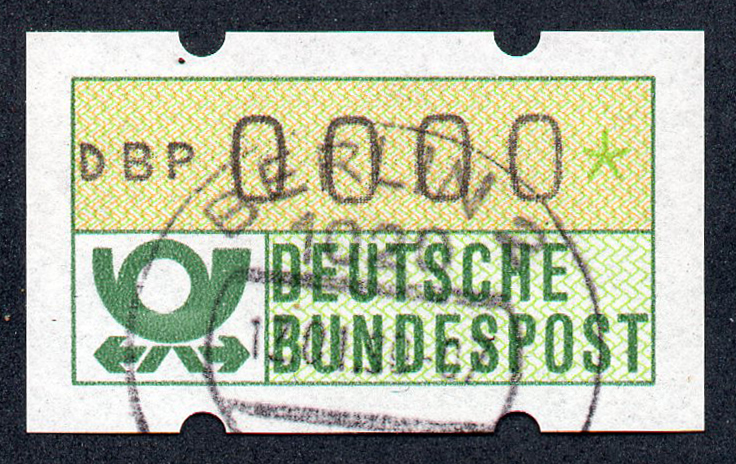 Automaten-Briefmarke der Deutschen Bundespost